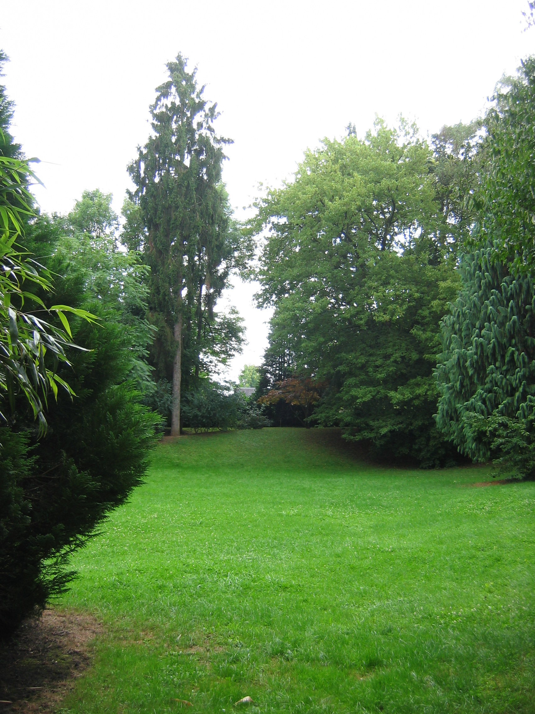 Parc Pierquin Charleville-Mézières Ardennes France